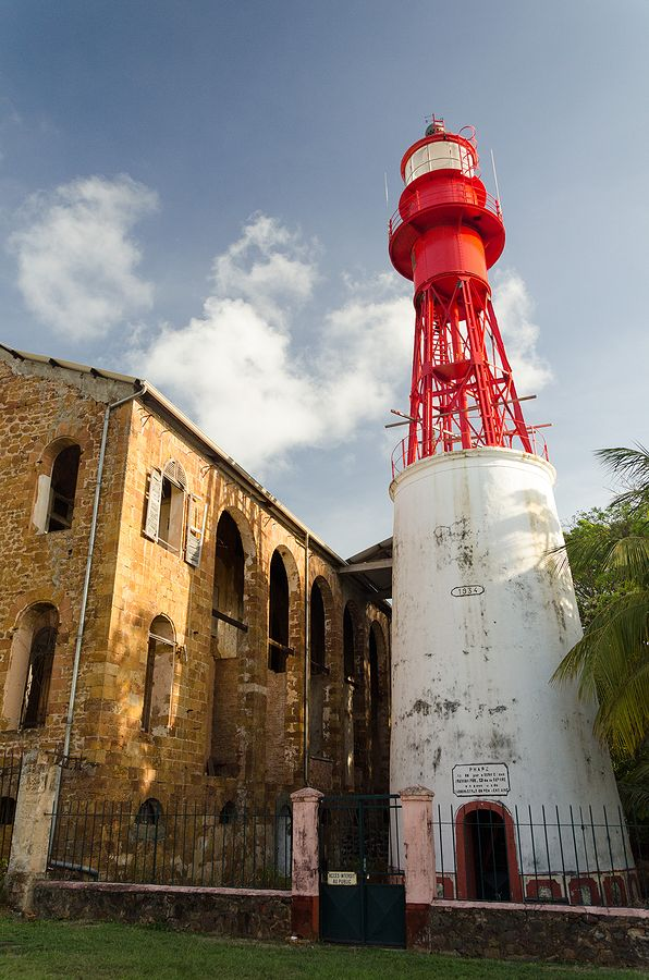 Phare des îles du salut.